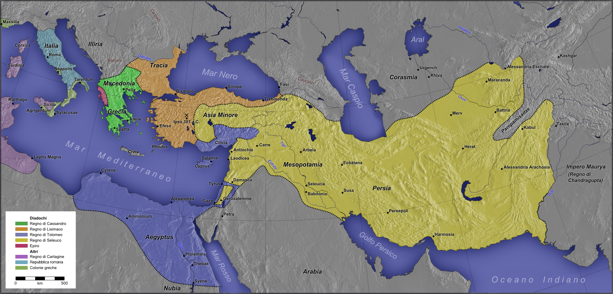 Italian version